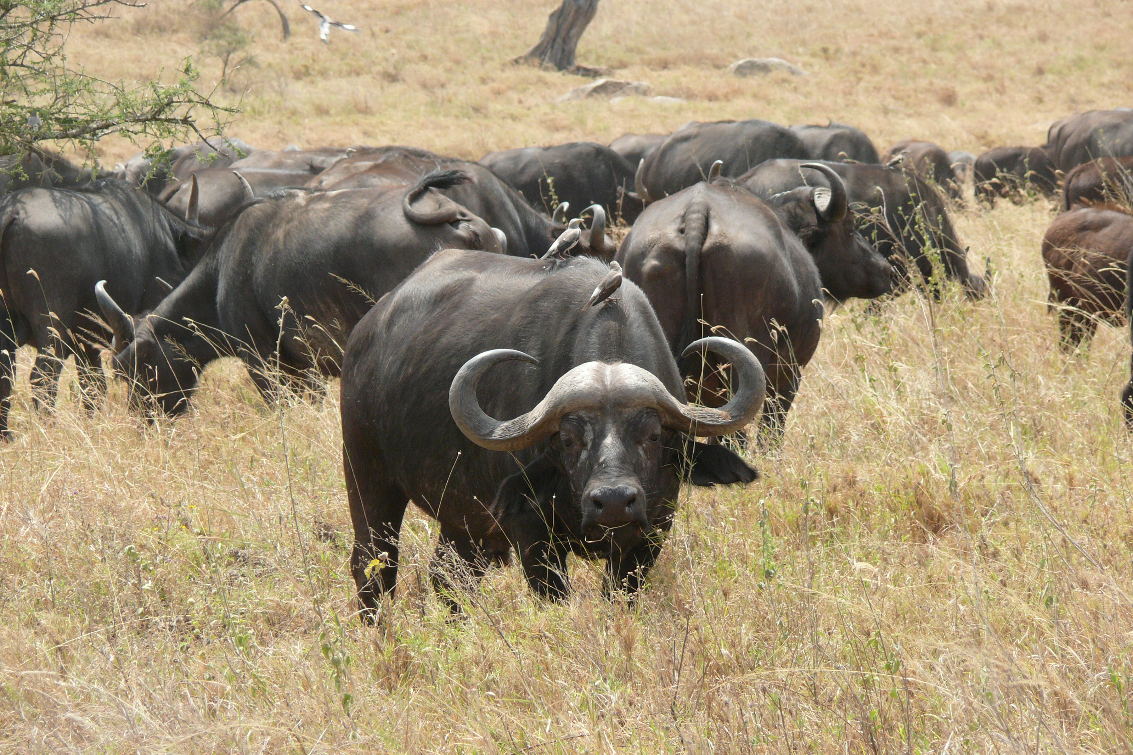 Afrikanische Büffel (Syncerus caffer)